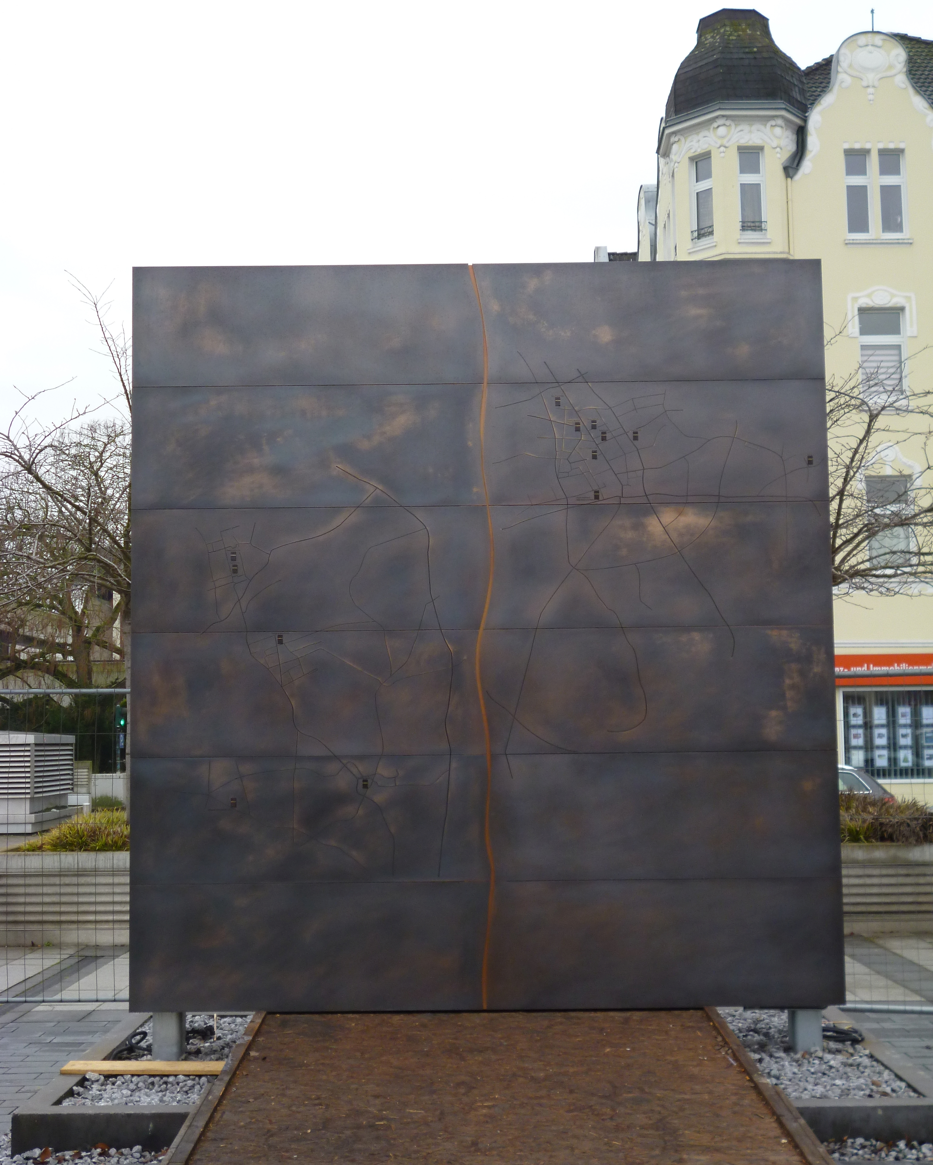 Shoah-Mahnmal in Herne, geschützt durch aufschiebbare Messingtore